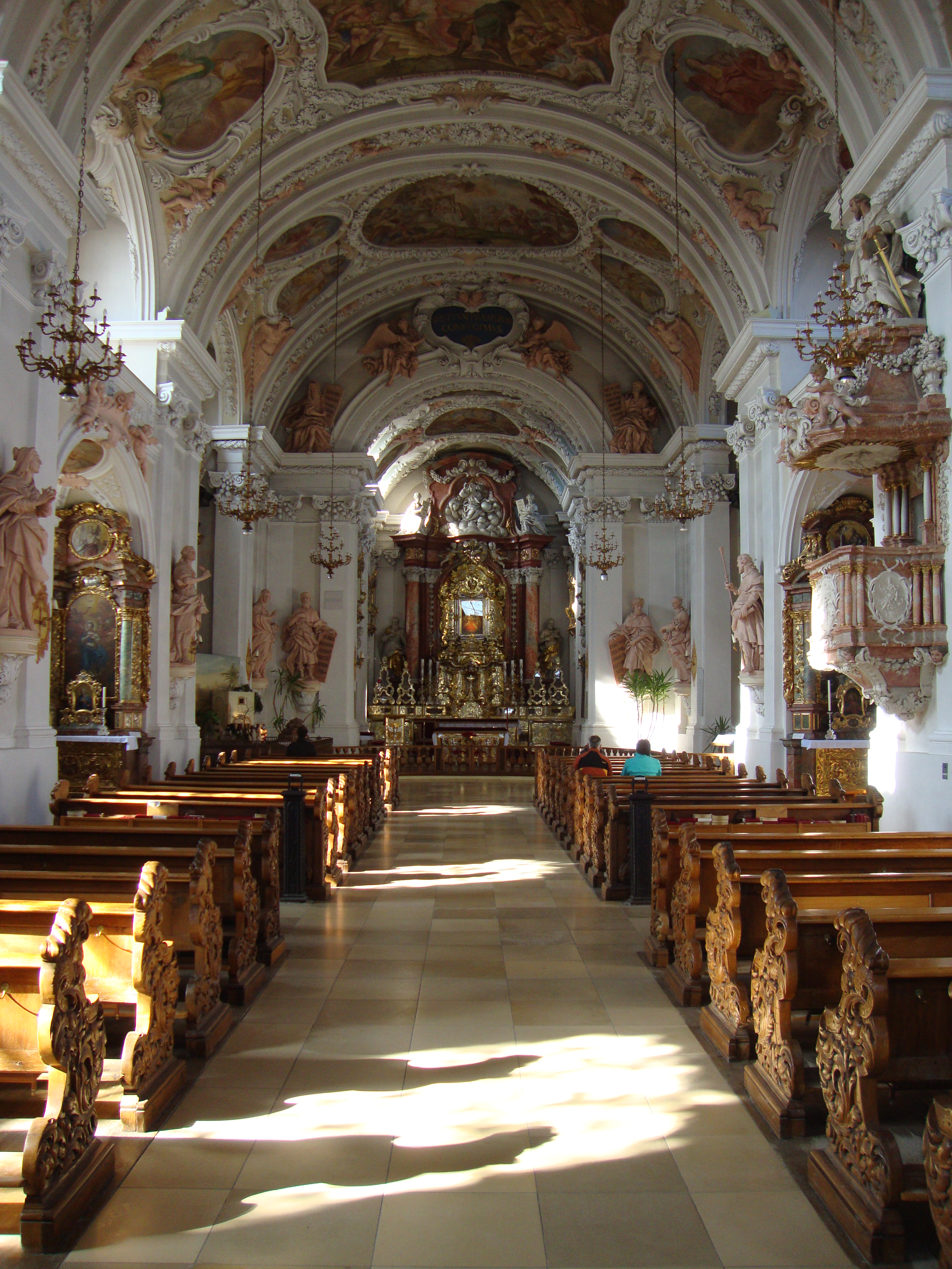 Amberg, Wallfahrtskirche Mariahilf: Innenansicht